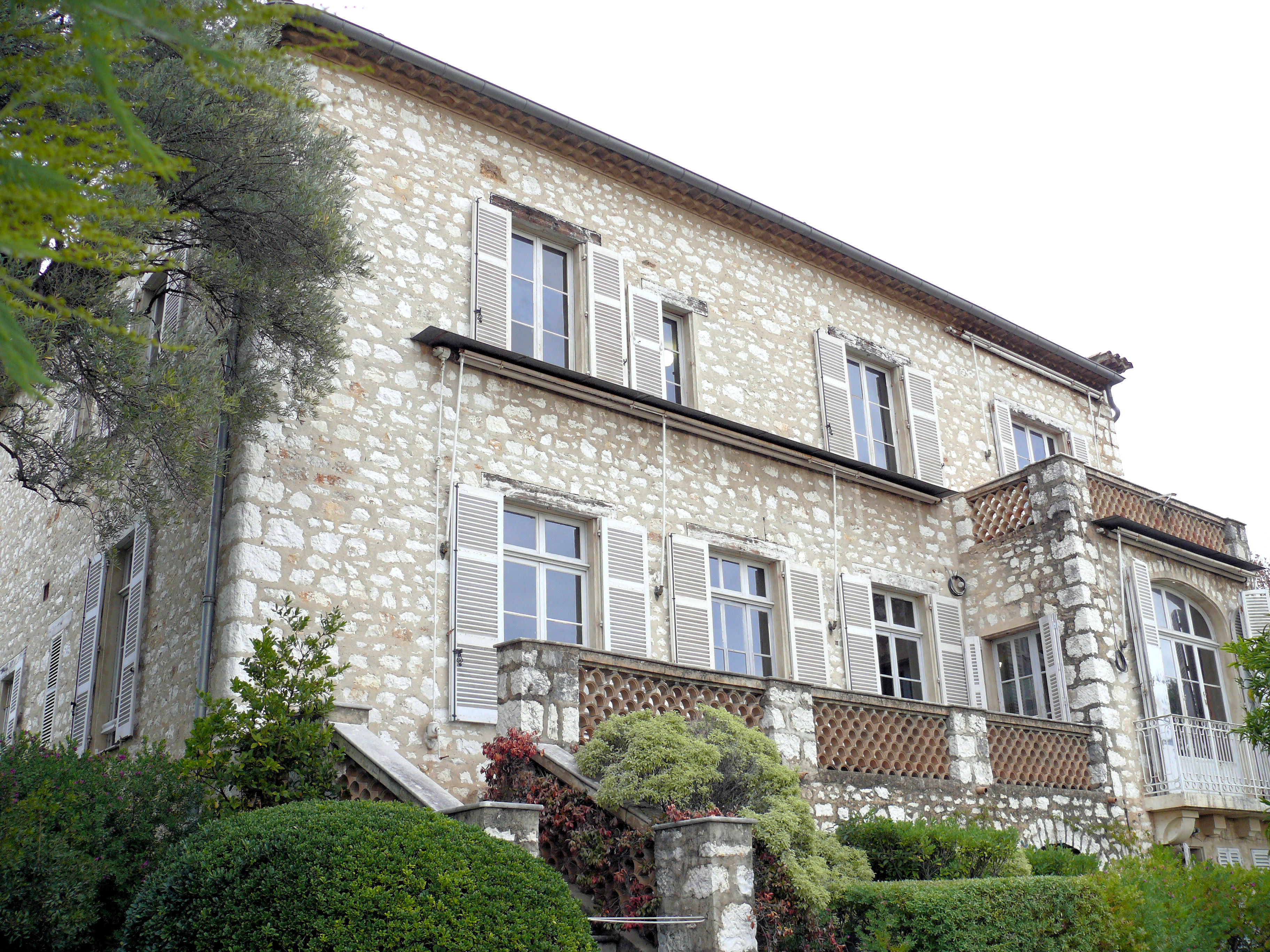 Cagnes-sur-Mer - Domaine des Collettes - Musée Renoir - Villa